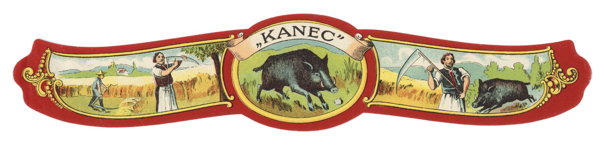 Aufkleber für eine Sense des Sensenwerks Steinhub. Der dargestellte Eber (tschech. „kanec“) bezieht sich auf das Werkszeichen „Wildschwein“.